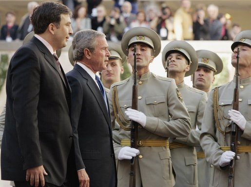 Der georgische Präsidente Micheil Saakaschwili (links) und US-Präsident George W. Bush (rechts) schreiten in Tiflis (Georgien) die Ehrengarde georgischer Soldaten ab.